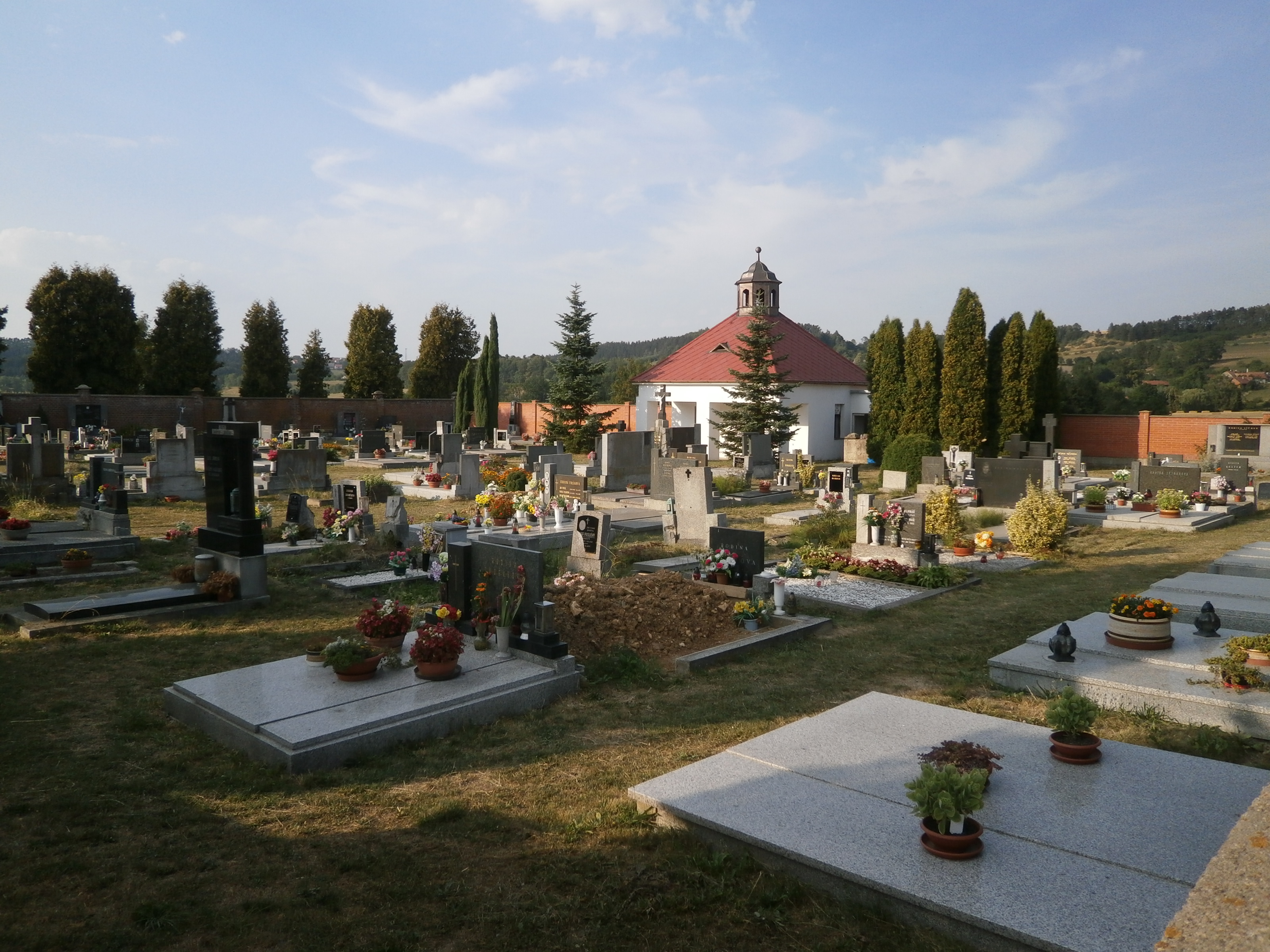 Leština - hřbitov